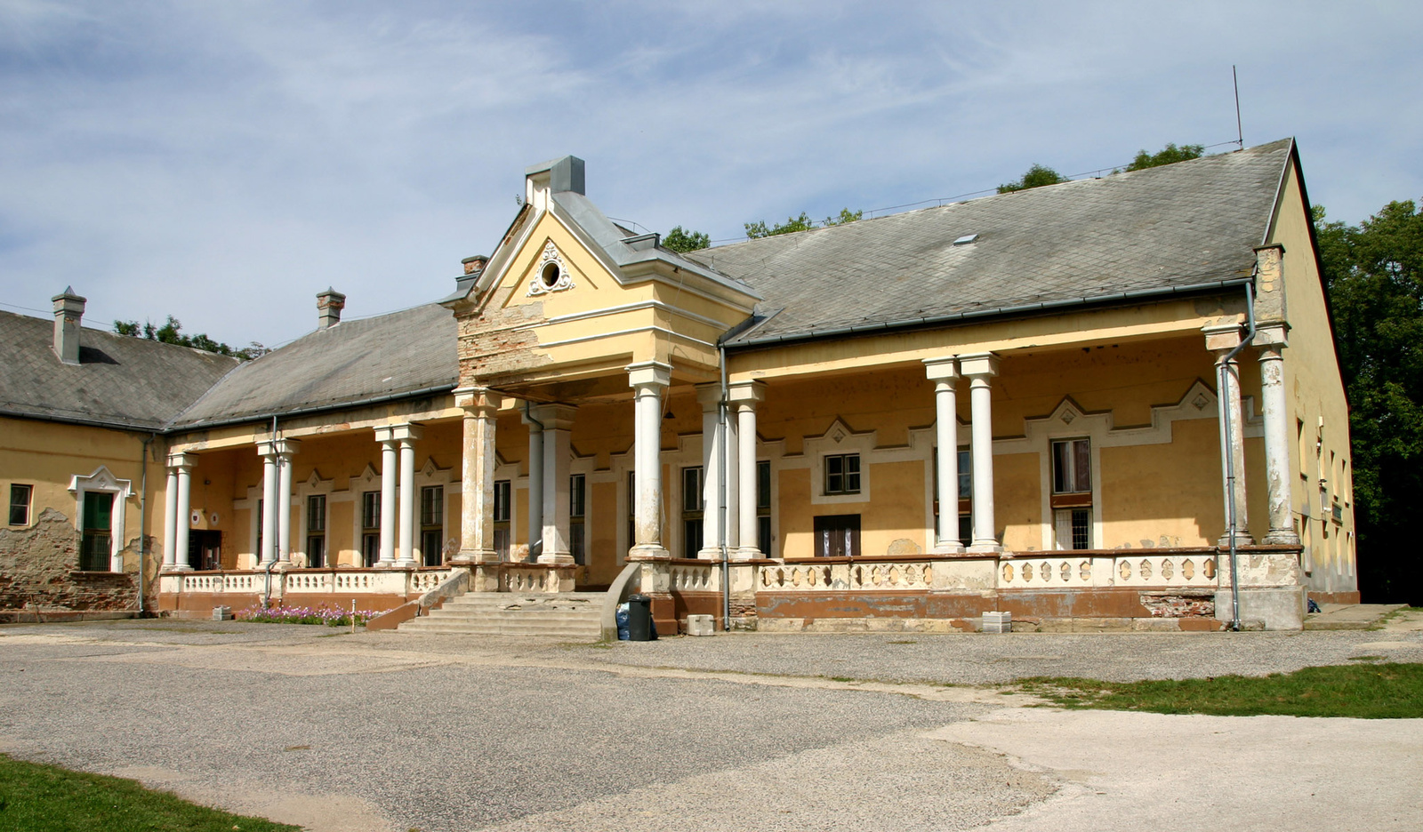 volt Zichy-kúria (Zichyújfalu, Kastélykert)